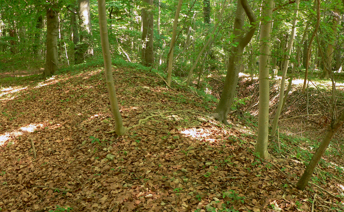 Ringwall auf dem Gehrdener Berg